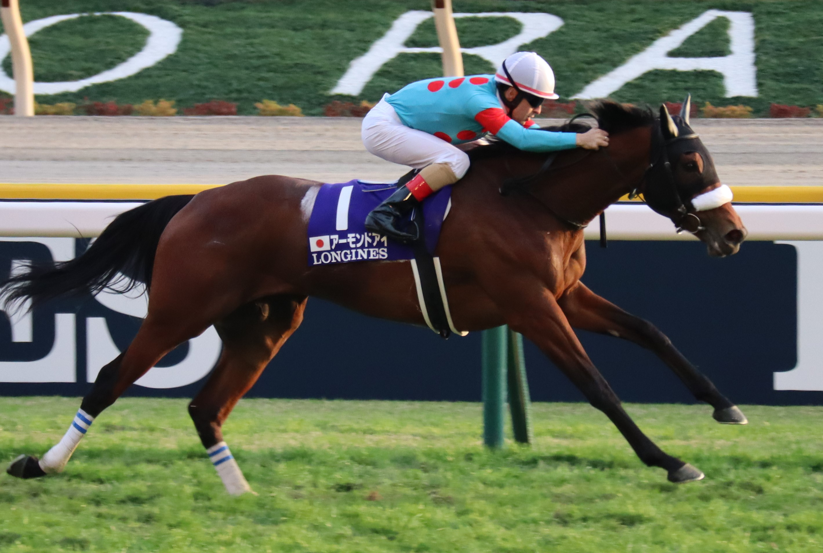 第38回ジャパンカップ出走時(2018年11月25日)